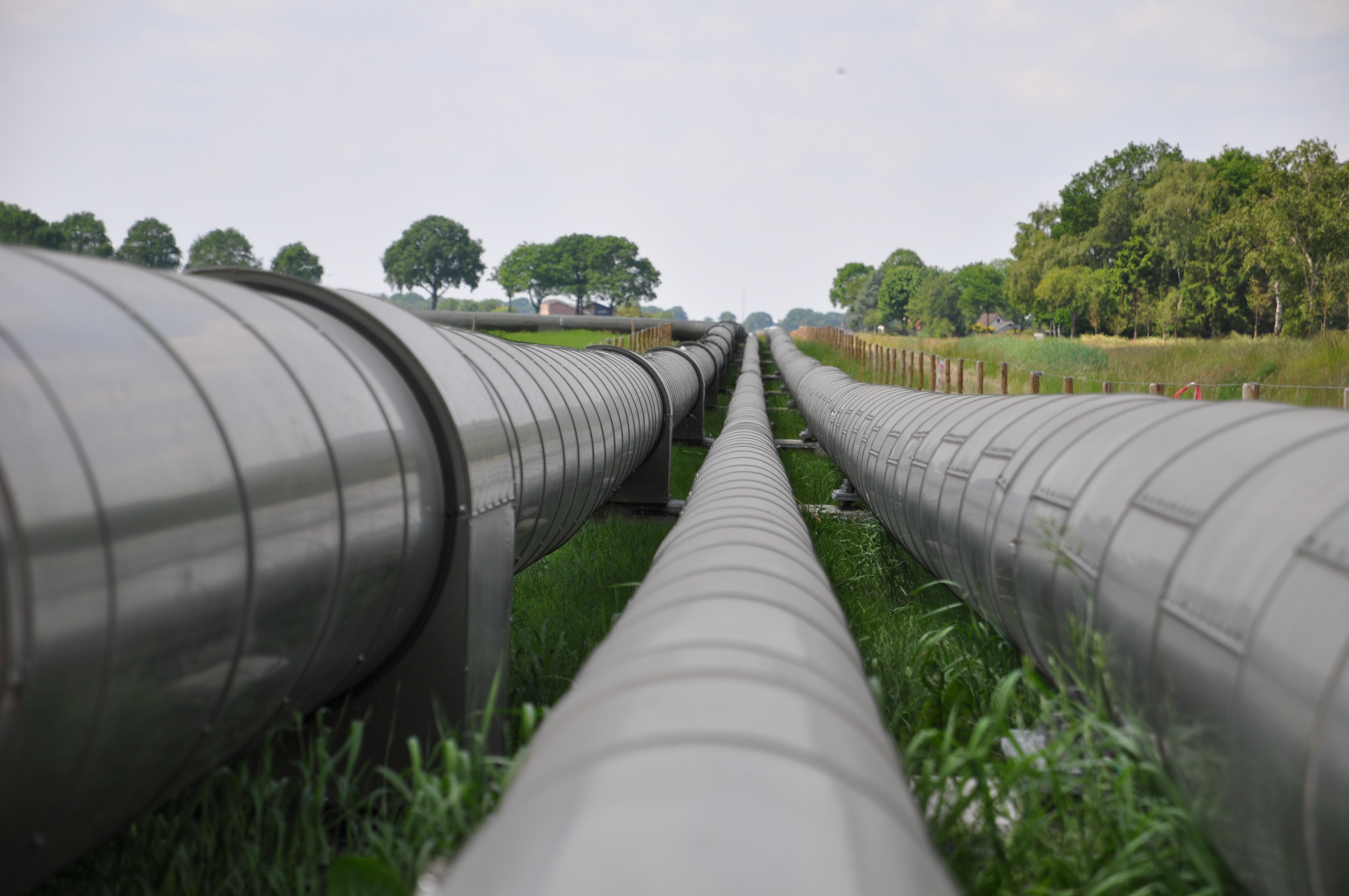 Buizen voor de oliewinning in Schoonebeek. De aan- en afvoer van hete stoom en olie kan niet ondergronds plaatsvinden. Door de grote temperatuurverschillen moeten de buizen kunnen krimpen en uitzetten. Daarom lopen de buizen bovengronds en worden er speciale bochten in gelegd. De buizen volgen de lijnen in het landschap, zodat ze minder opvallen.